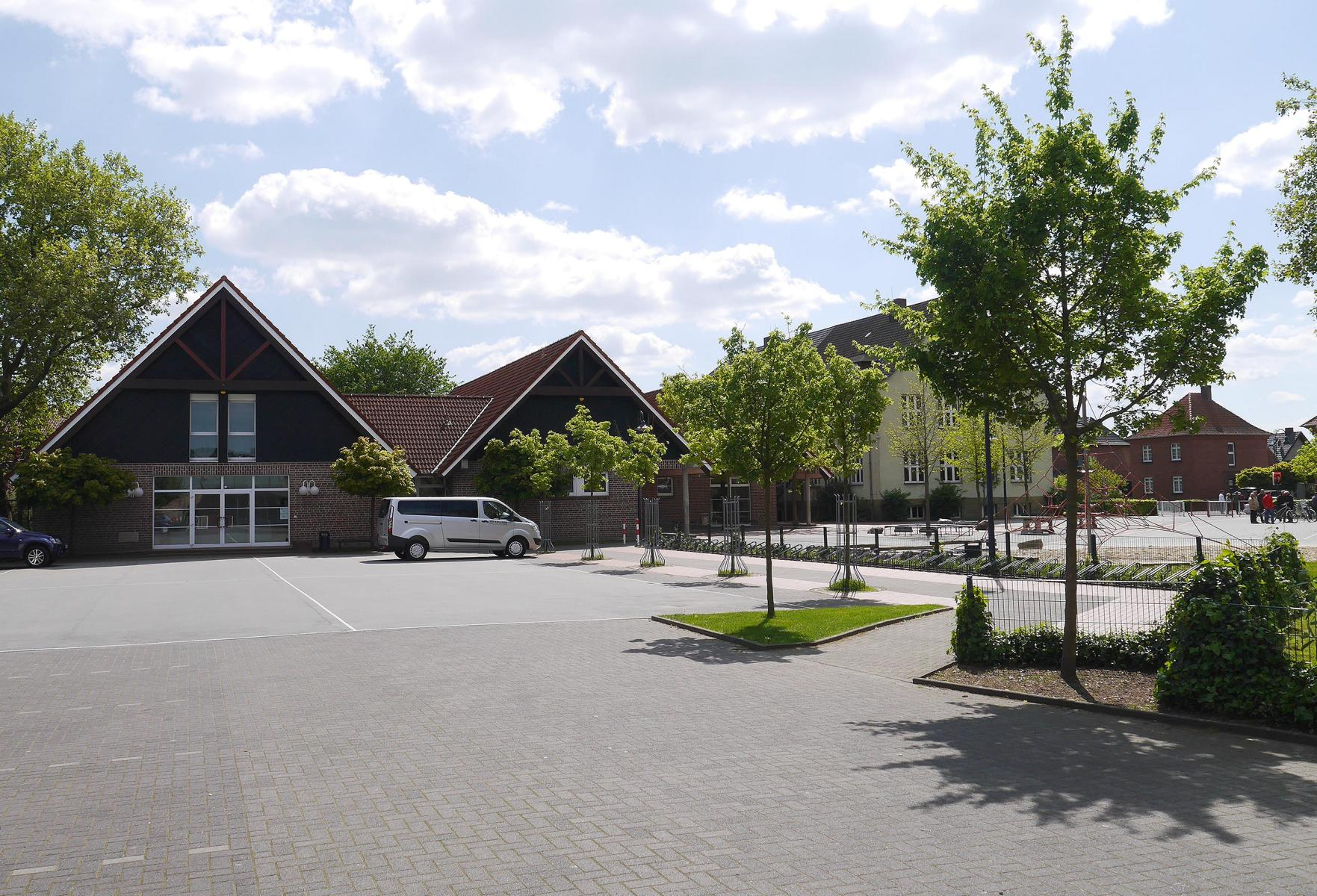 Josefschule in Herzebrock